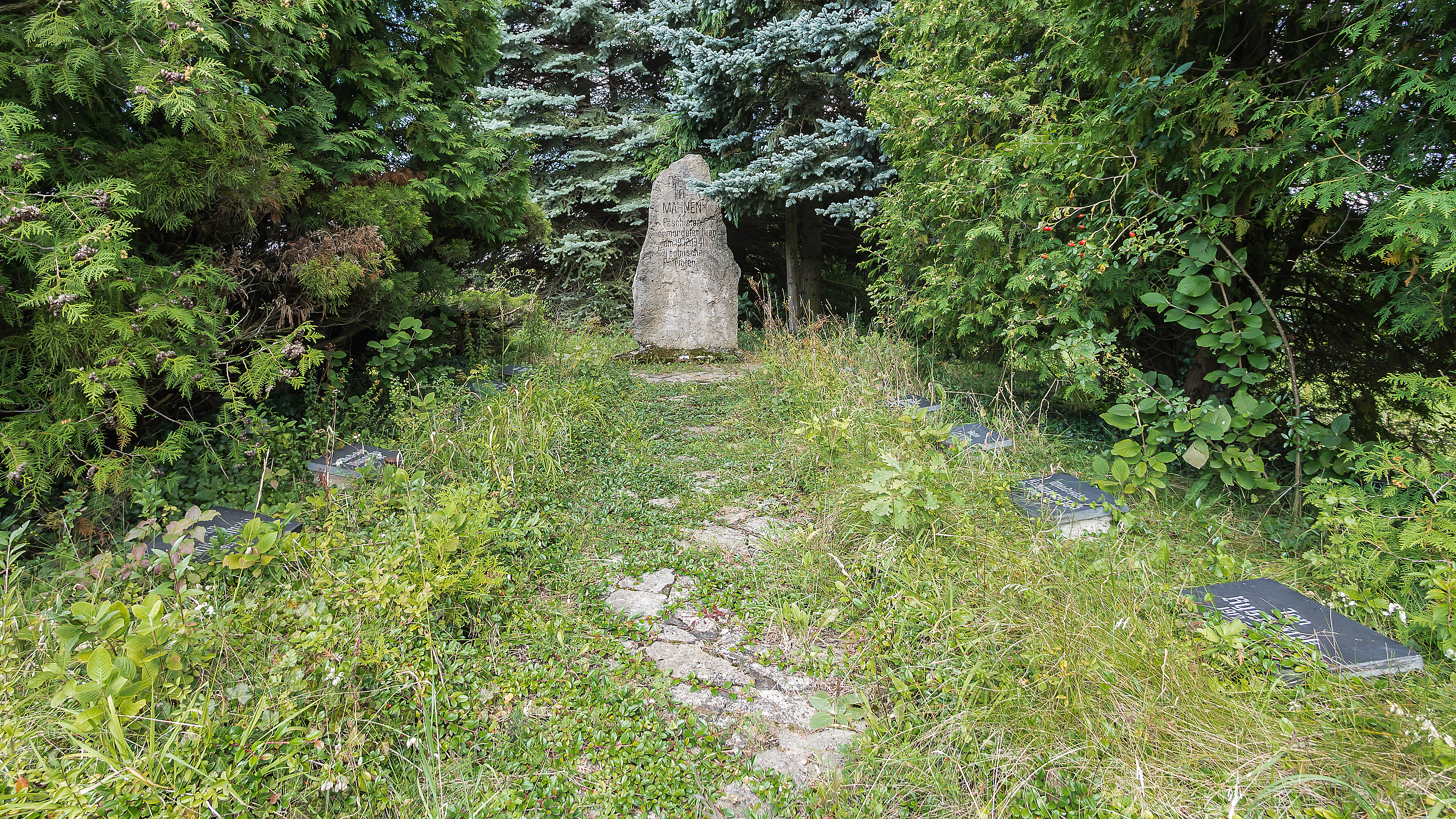 Bechstedt-Thuringia Gedenkstätte für elf polnische Buchenwald-Häftlinge